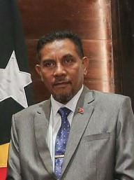 António Maria Nobre Amaral Tilman im Palácio Presidente Nicolau Lobato